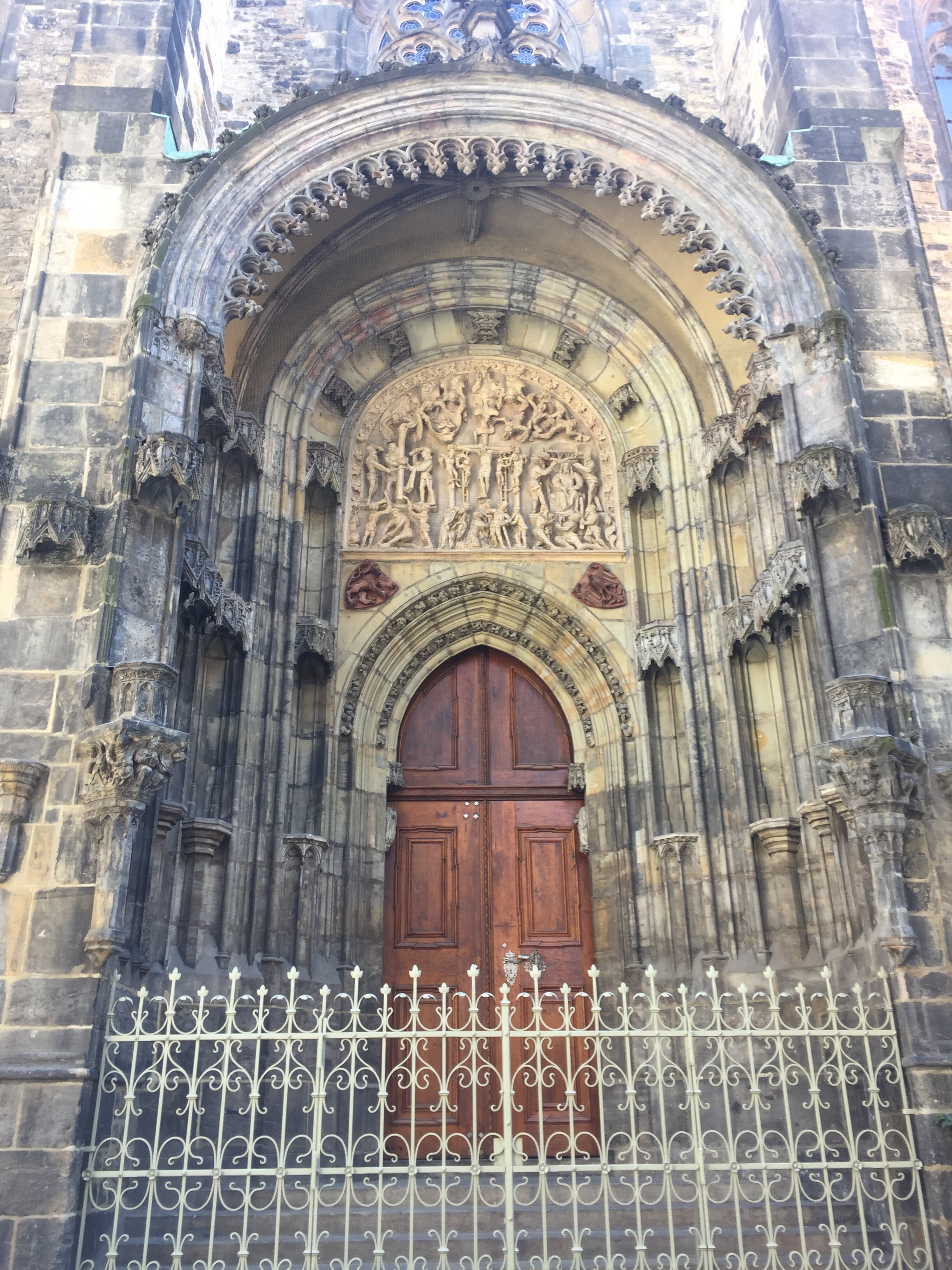 Portál s barokním reliéfem Madony s Jezulátkem v náručí